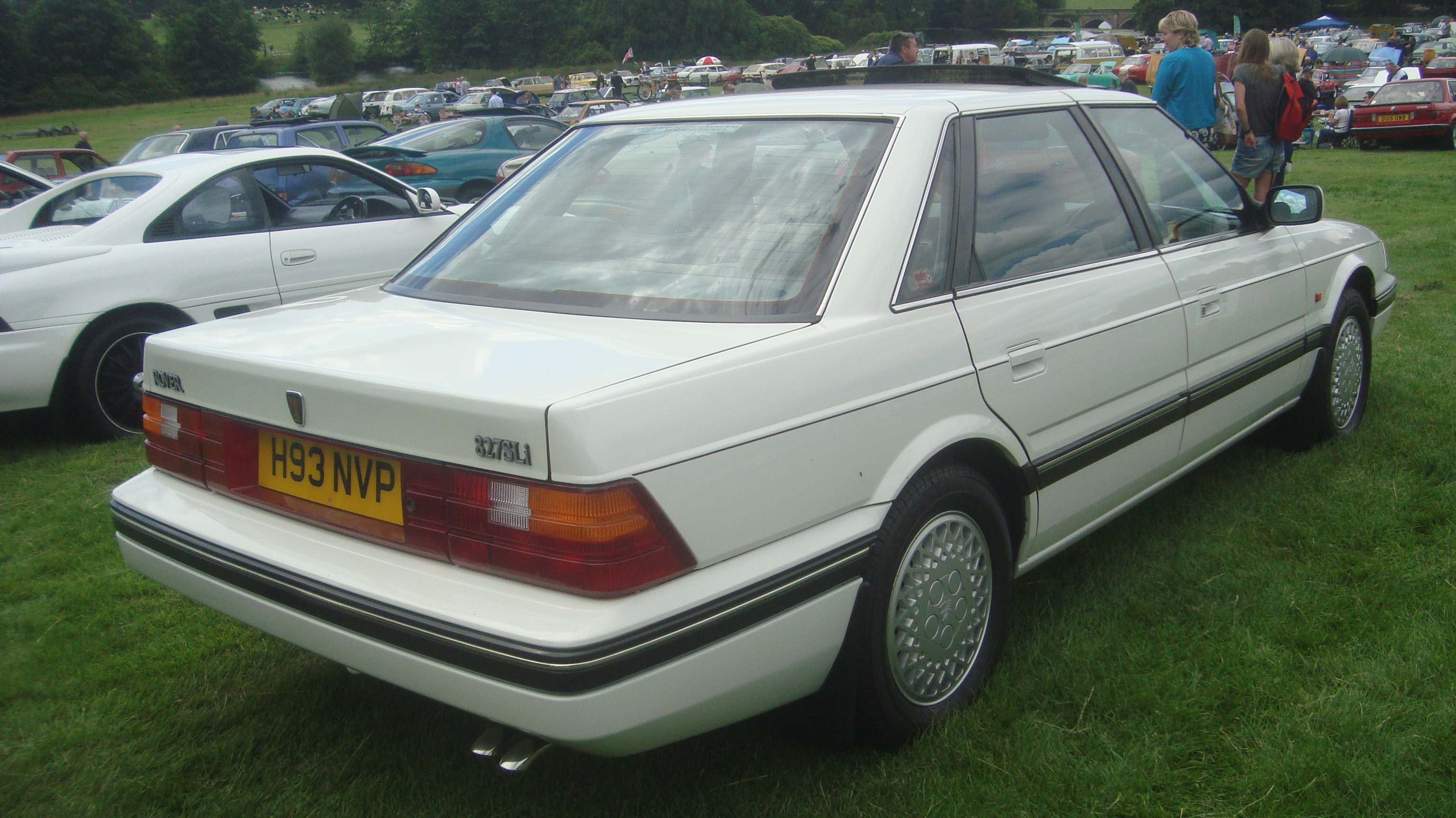 1991 Rover 827 SLi Saloon